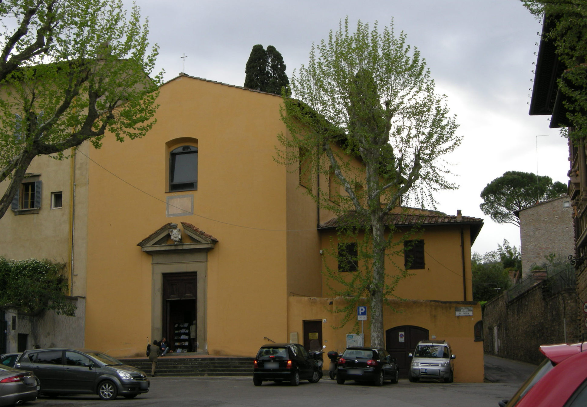 San francesco di paola (florence)